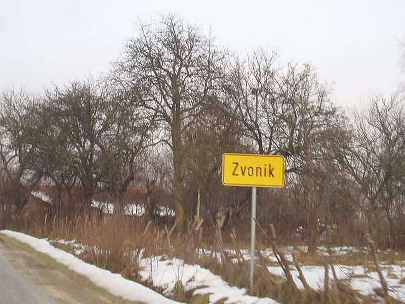 Zvonik - Entrance